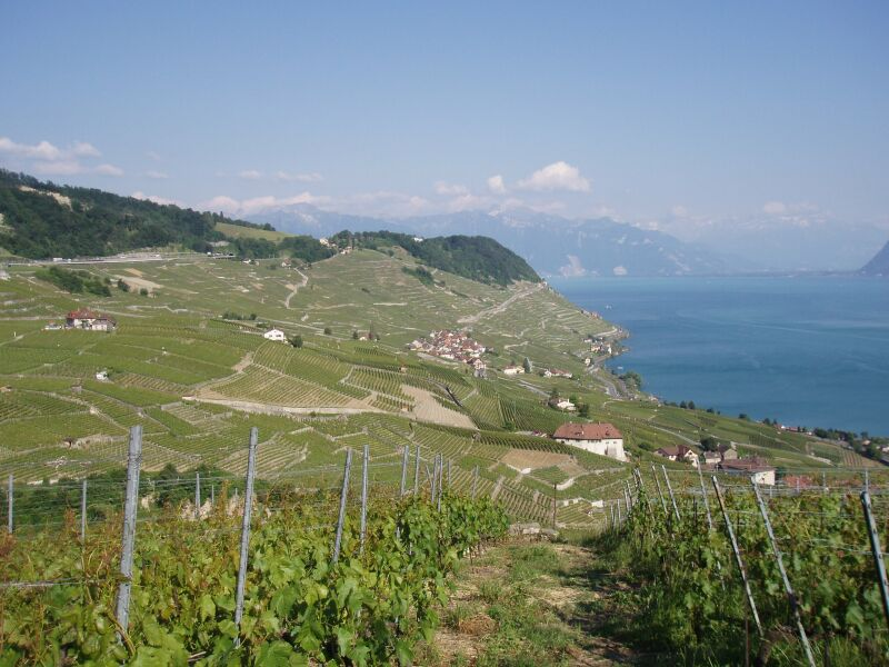 Ausschnitt des Lavaux am Genfersee, in der Bildmitte das Winzerdorf Epesses